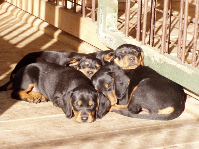 Slovakian Hound/Slovenský kopov